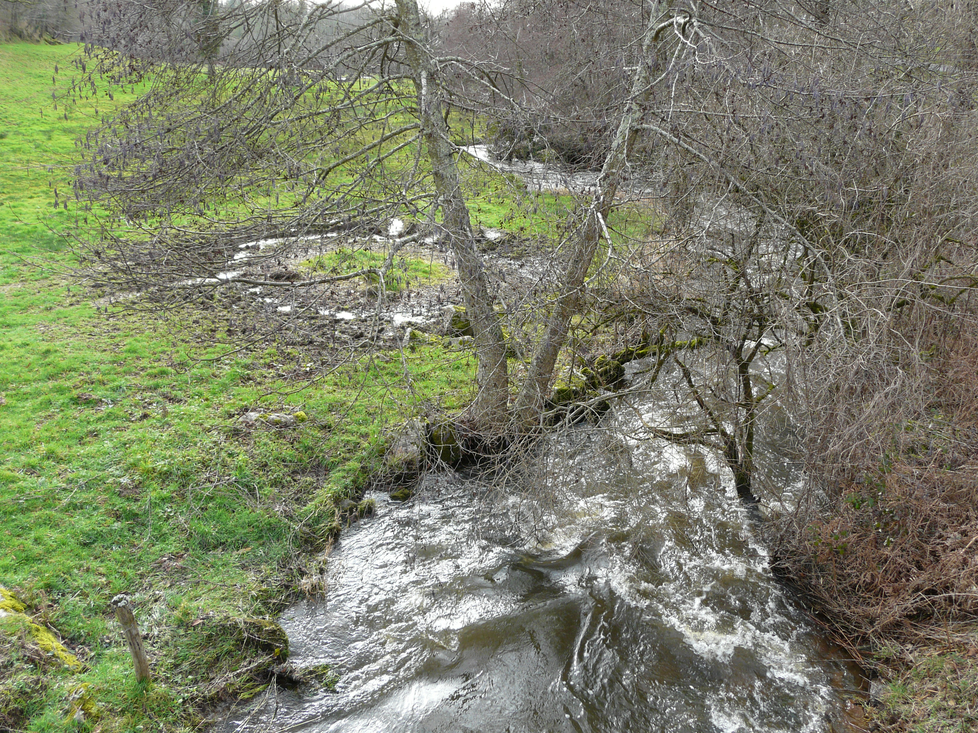 Le Nauzon marque la limite entre Champniers-et-Reilhac, (Dordogne, région Aquitaine) à gauche, et Maisonnais-sur-Tardoire (Haute-Vienne, région Limousin). Vue prise vers l'aval au pont des routes départementales 110 et 33a.